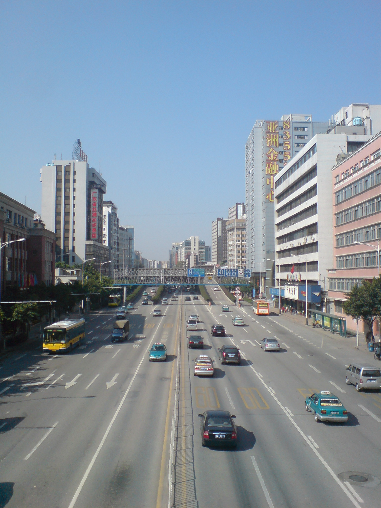 广州东风西路